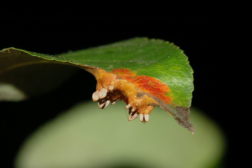 Gymnosporangium sabinae, Birnengitterrost, Frankfurt am Main, Nied, Deutschland, Germany